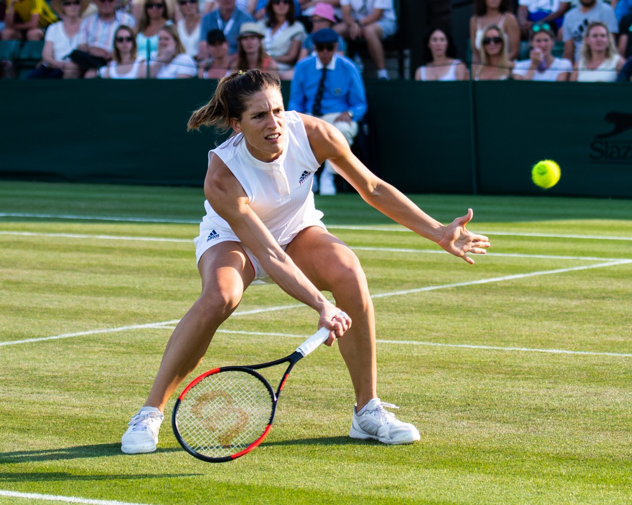 Andrea Petkovic